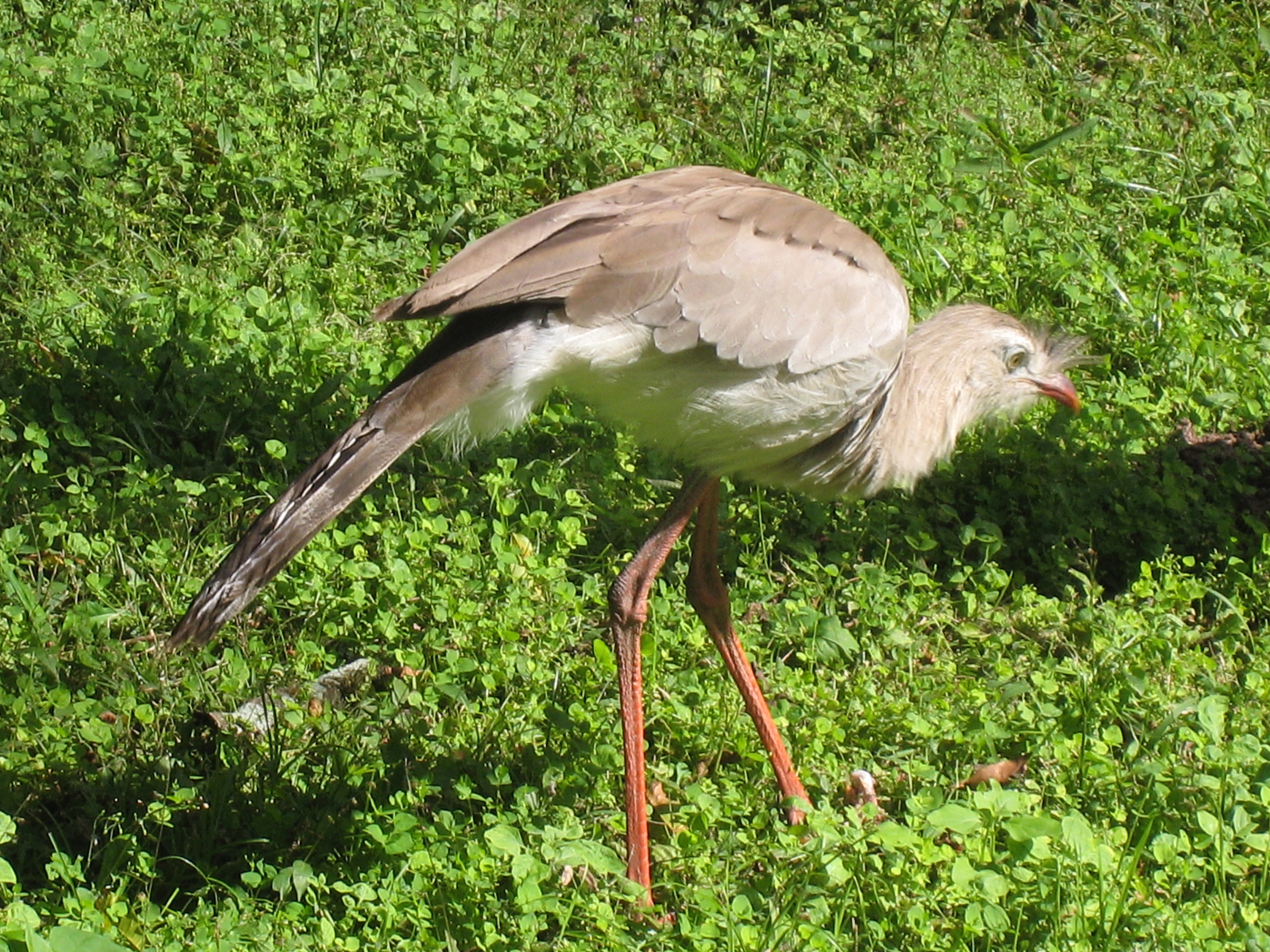 Cariama cristata, El Rey National Park, Argentina.